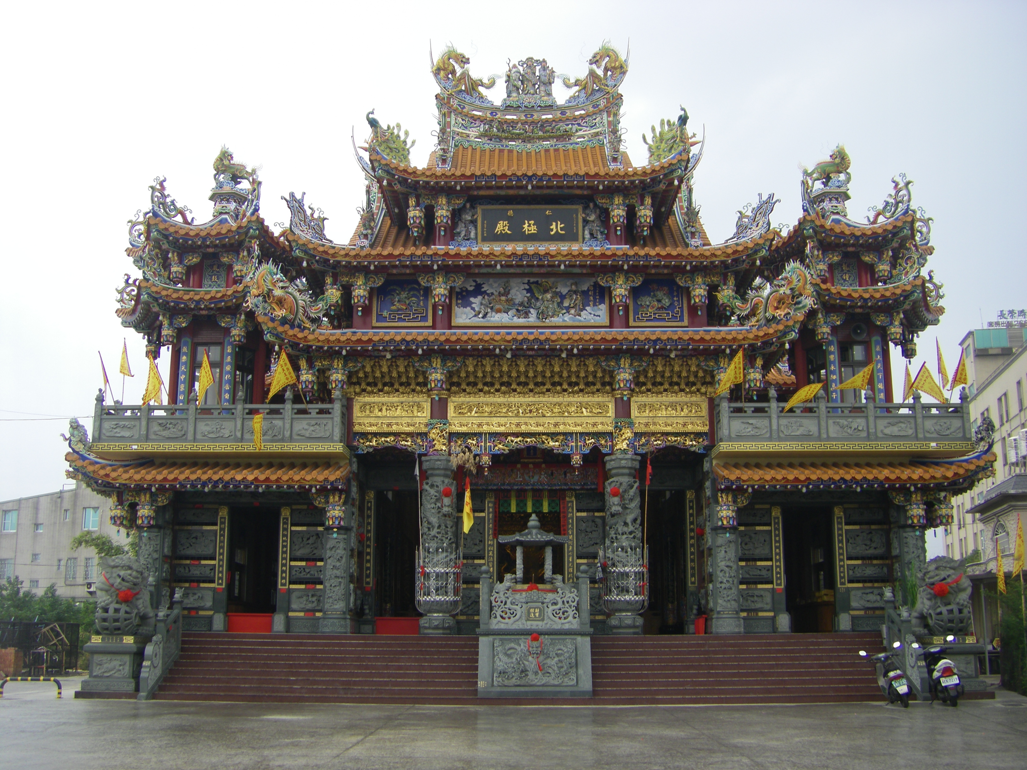 中文（台灣）: 位為台南市仁德區的仁德北極殿